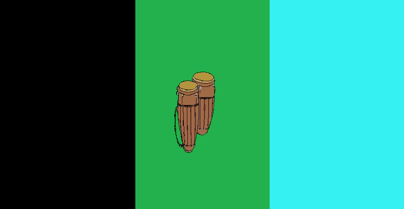 Bandera del municipio Sucre, estado Zulia, Venezuela